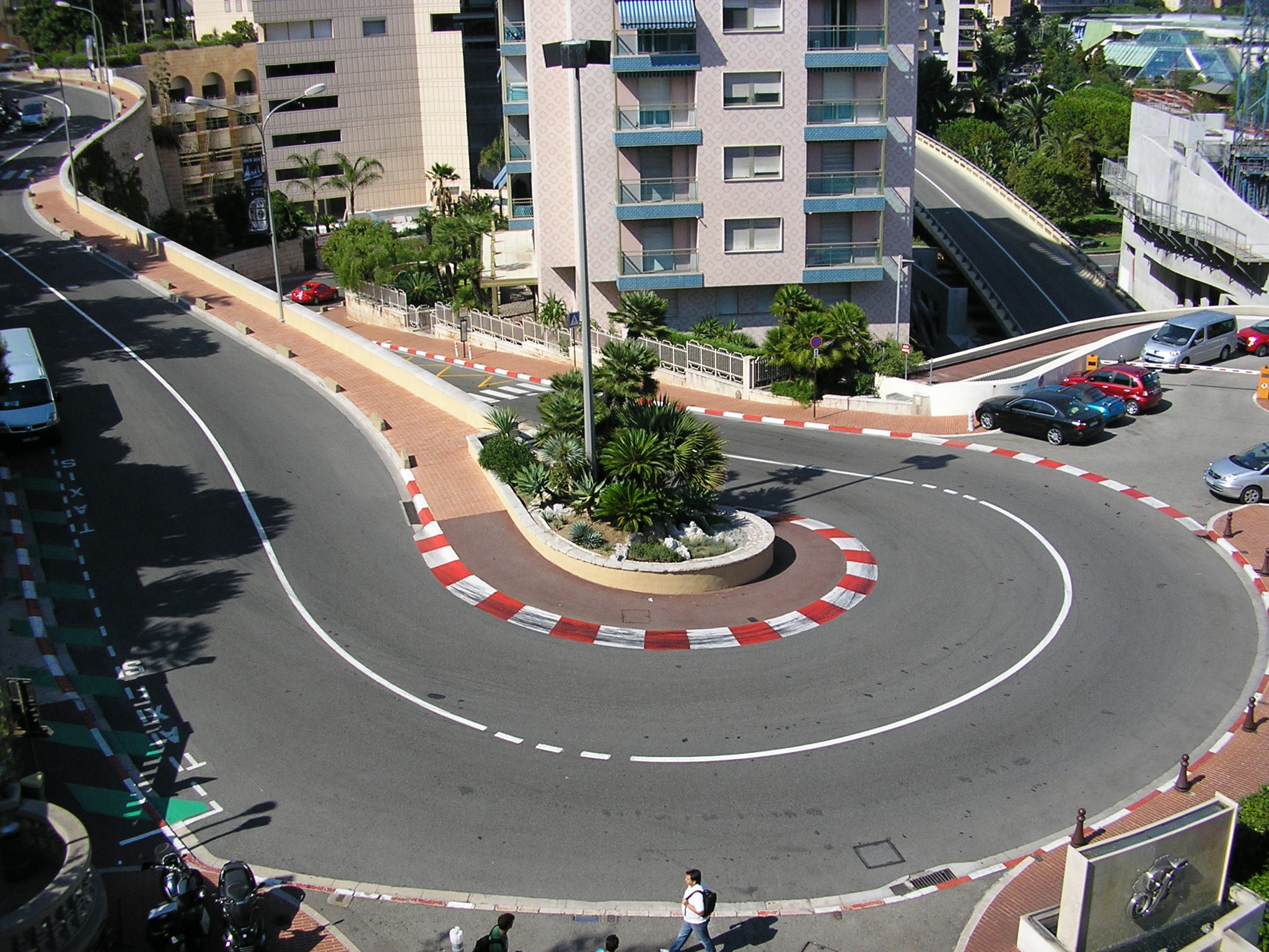 MONACO FORMULA 1 TURN 1